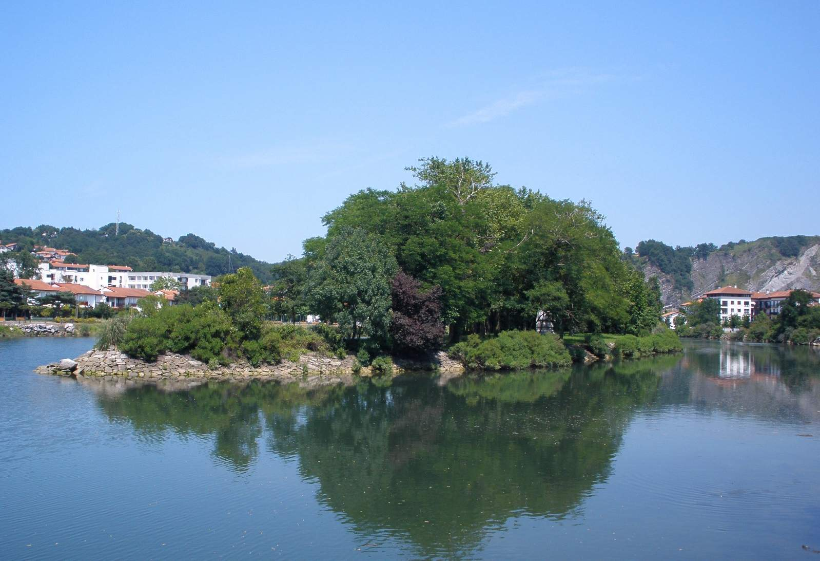 Isla de los Faisanes sobre el río Bisasoa, vista desde el lado español (Irún)